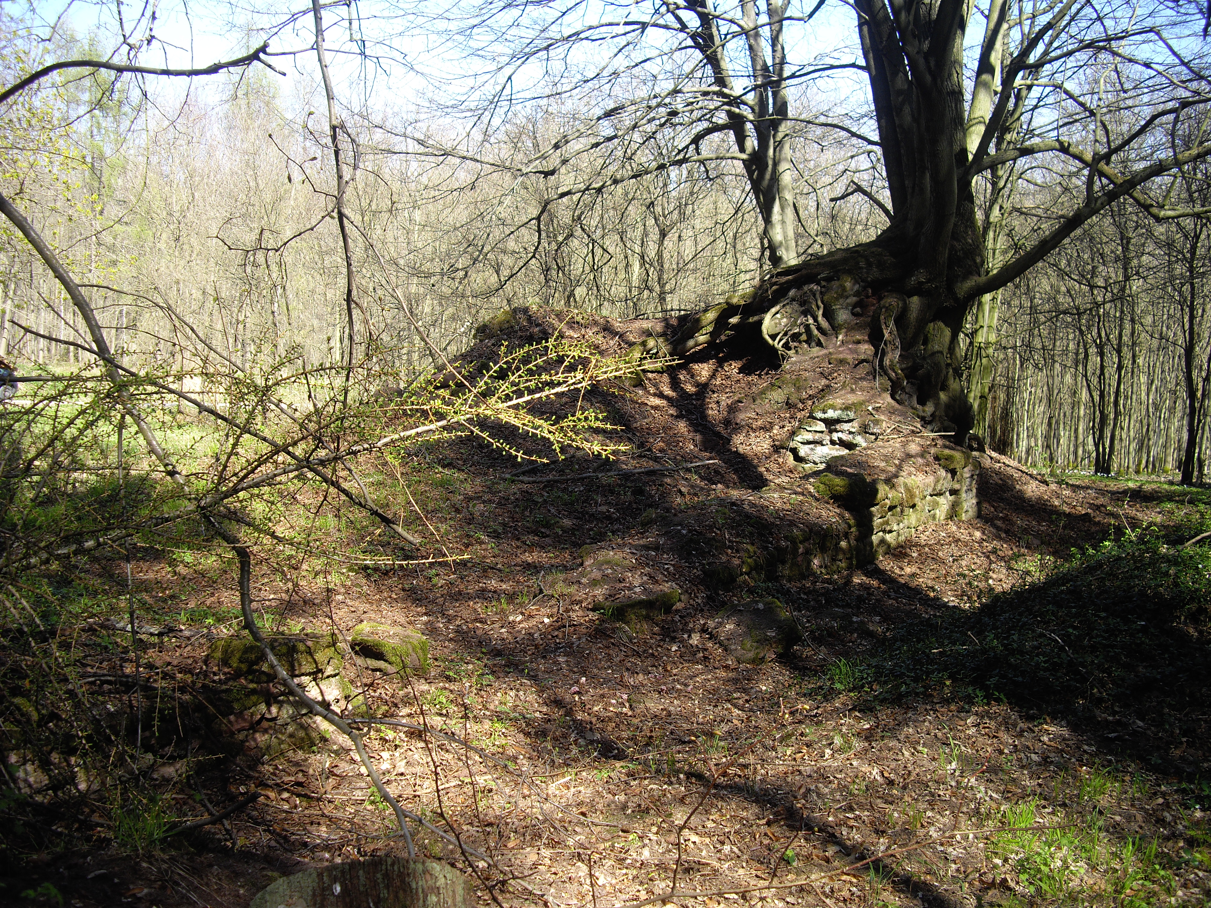 Das Schiff der Wüsten Kirche Schaubesfelde bei Emseloh